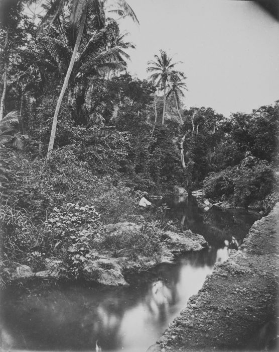 foto. Riviergezicht, Koepang